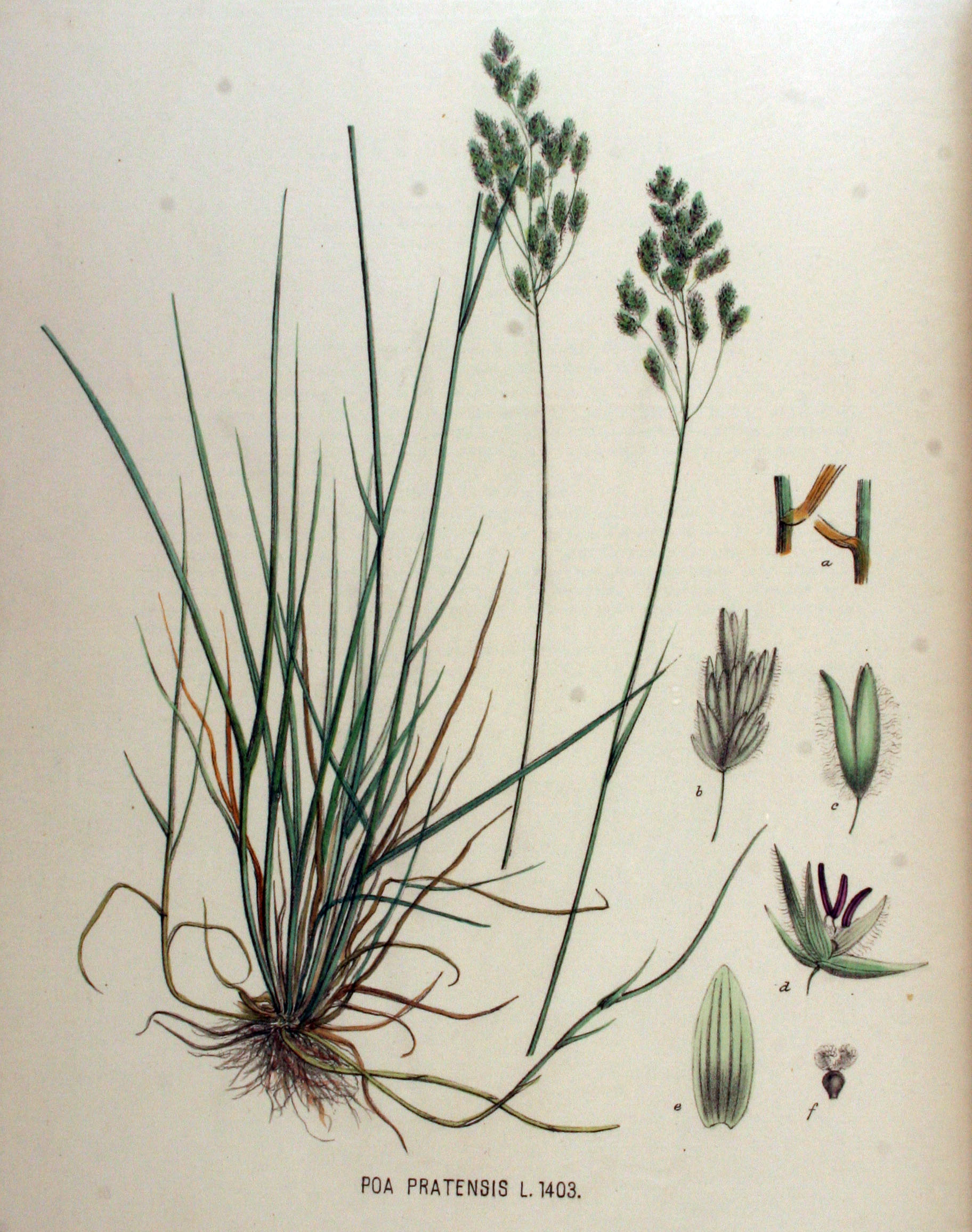 Poa pratensis L.